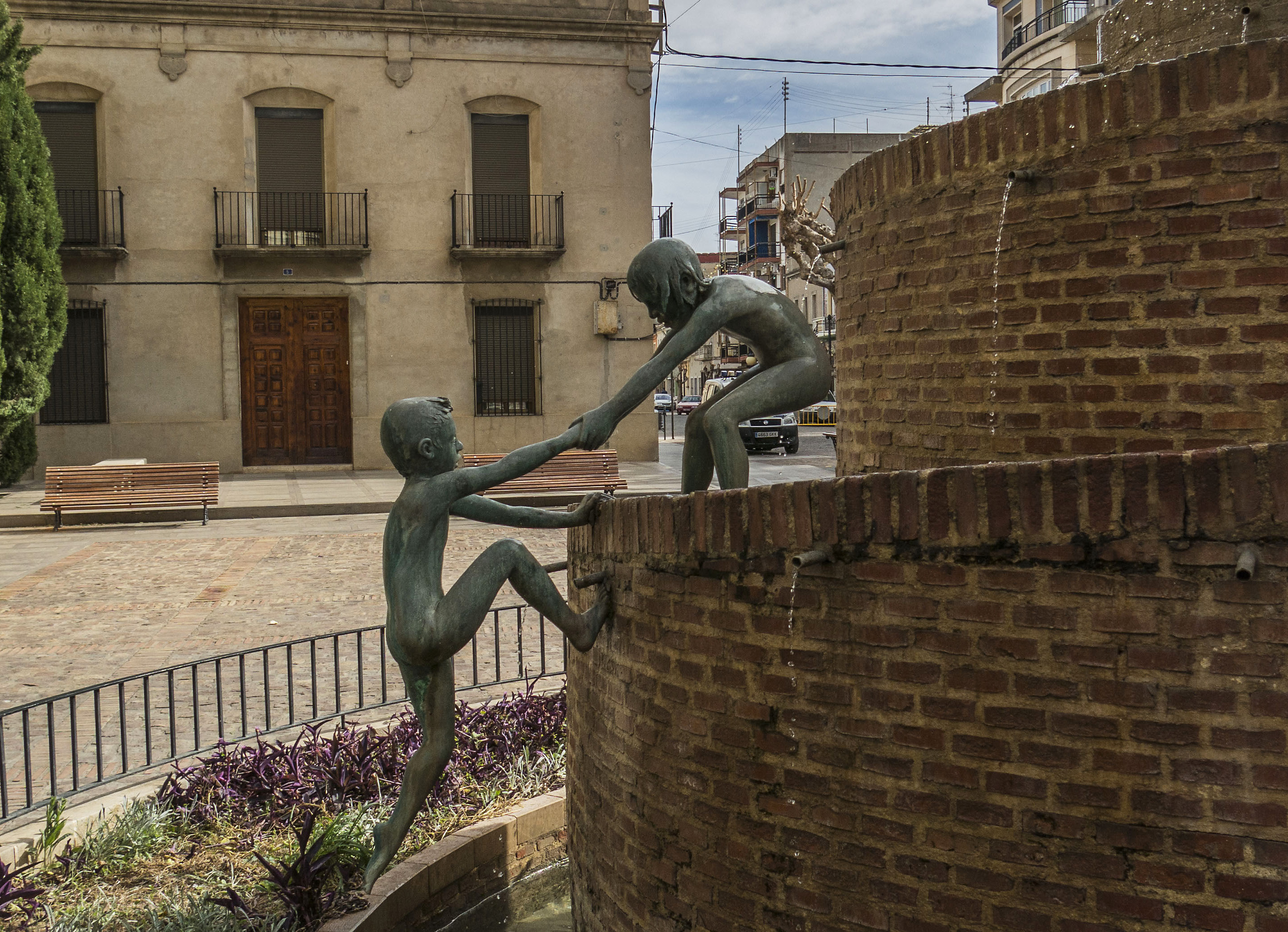 Obra de Manuel Boix. Albalat de la Ribera és un municipi del País Valencià, situat a la comarca de la Ribera Baixa.